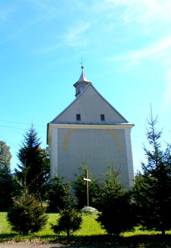 Przedwojów - rzymskokatolicki kościół filialny p.w. św. Józefa Oblubieńca, 1693-1696